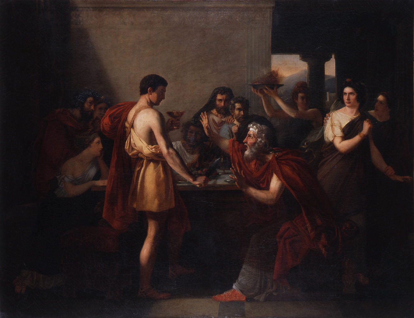 Antoine-Placide Gibert, Thésée reconnu par son père, 1832, Bordeaux, musée des Beaux-Arts